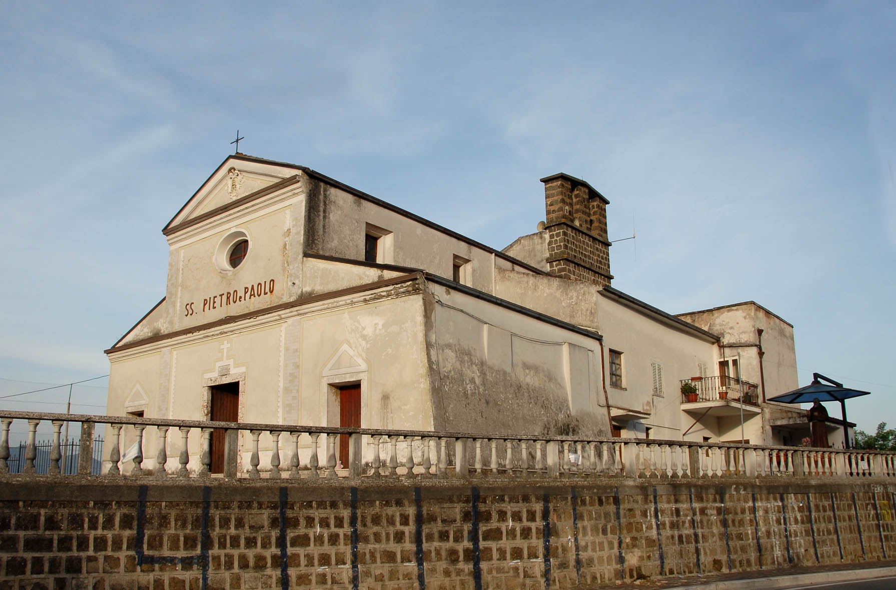 == Licenza d'uso: ==